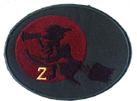 32 Pułk Lotnictwa Rozpoznania Taktycznego, 2. eskadra